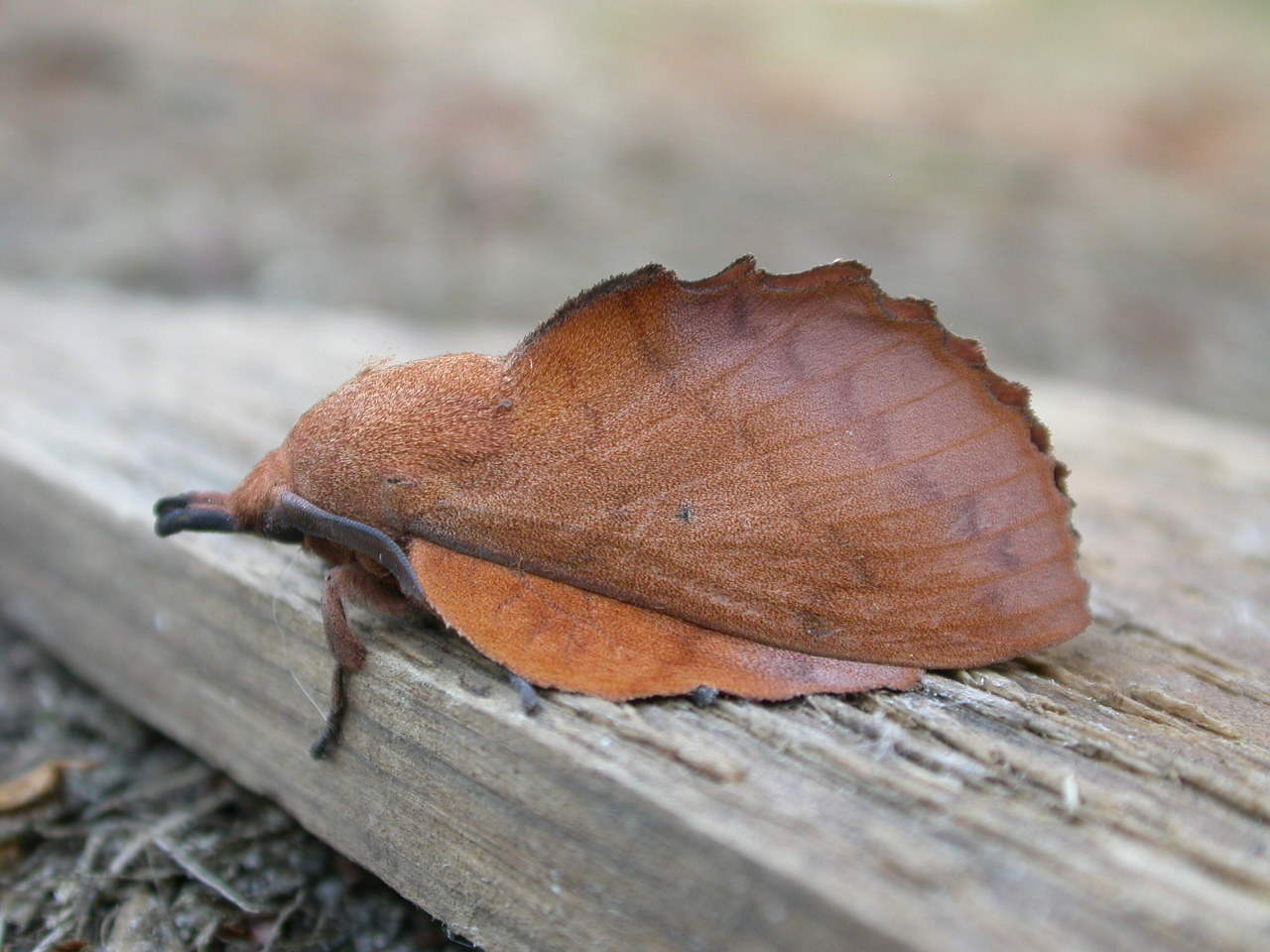 Gastropacha quercifolia, Gastes, Landes, SW France, 28/29 June 2003